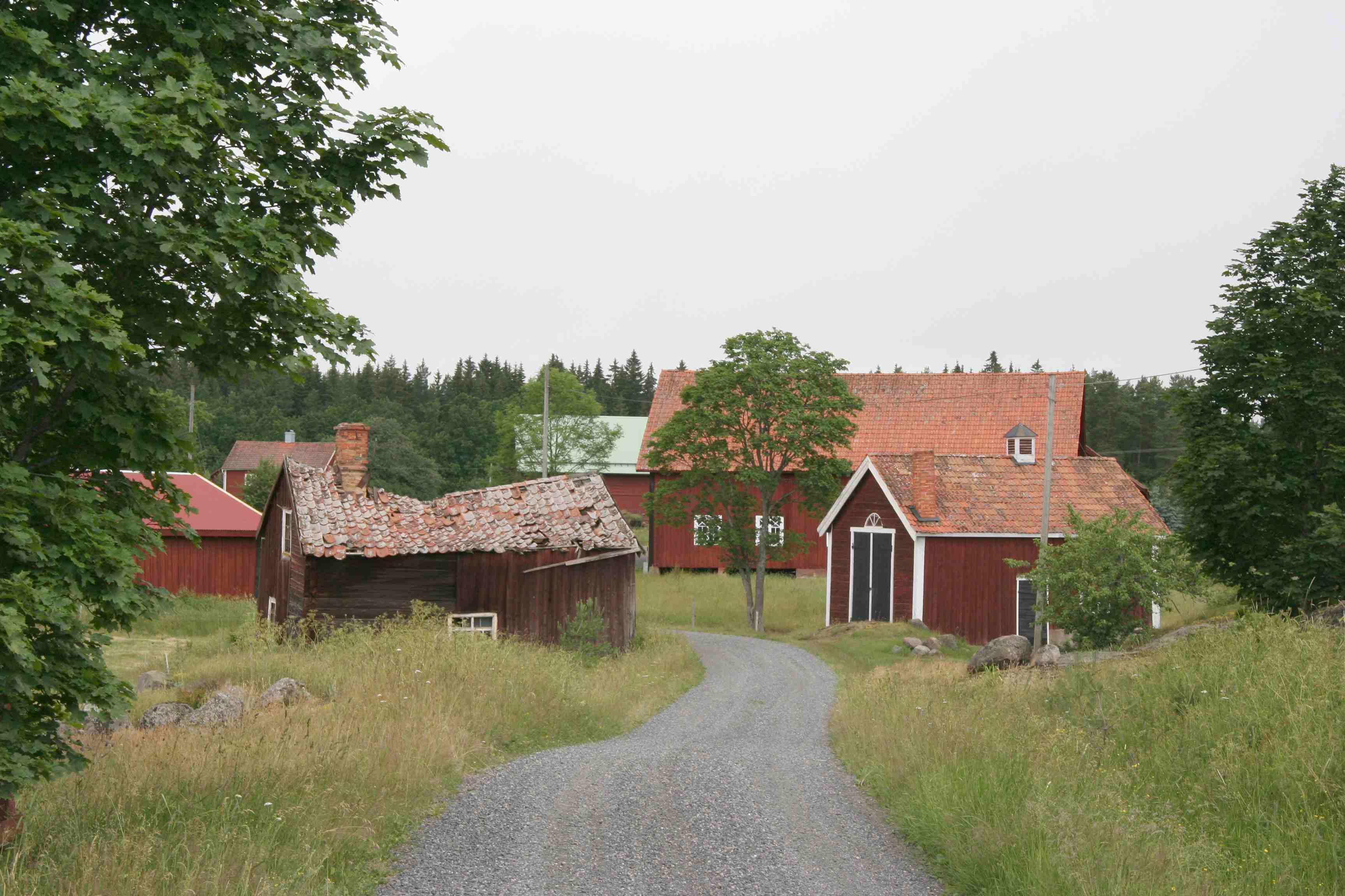 Bygatan i Härnum